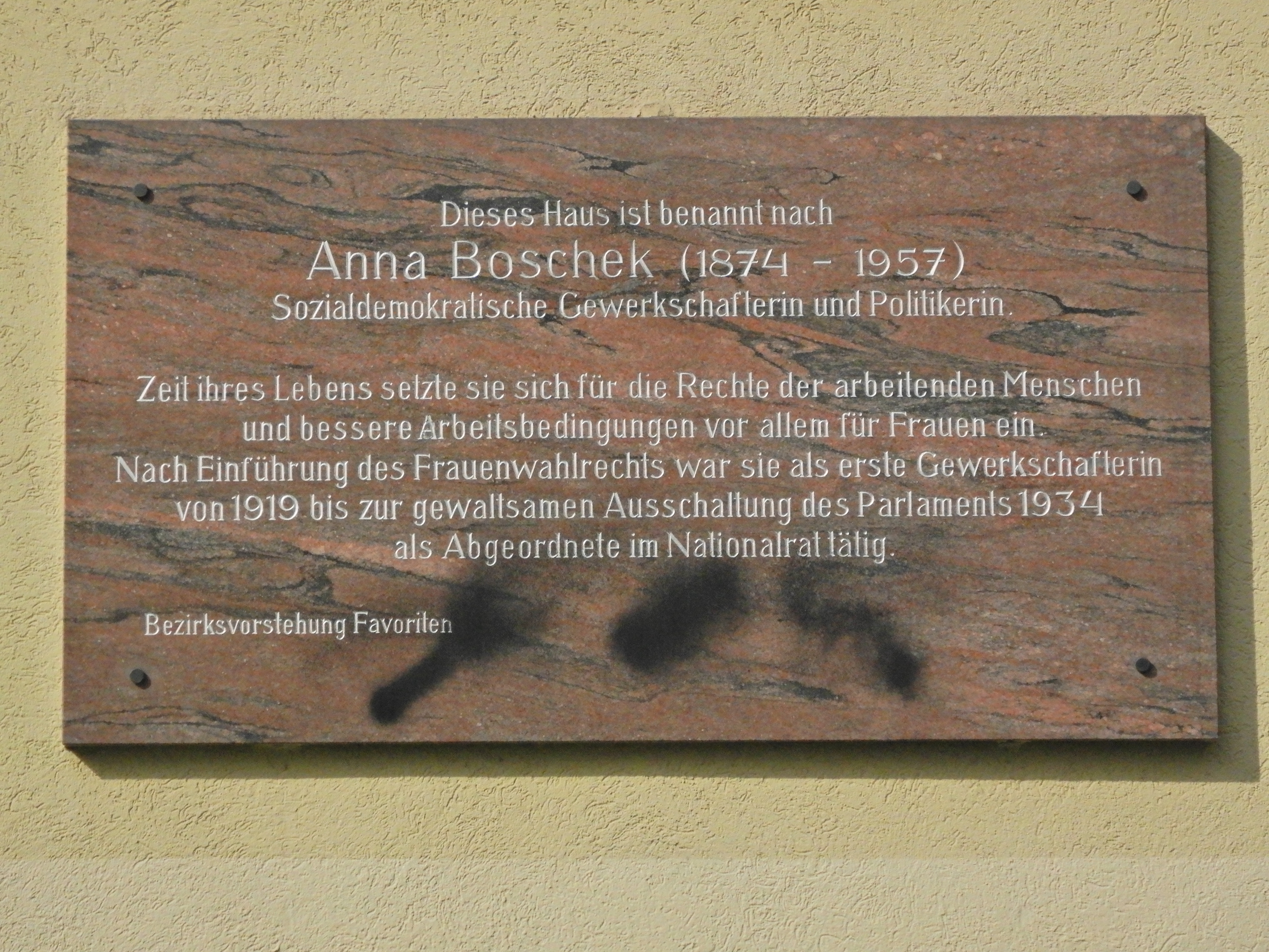 Gedenktafel für Anna Boschek (Wien, Davidgasse 76)